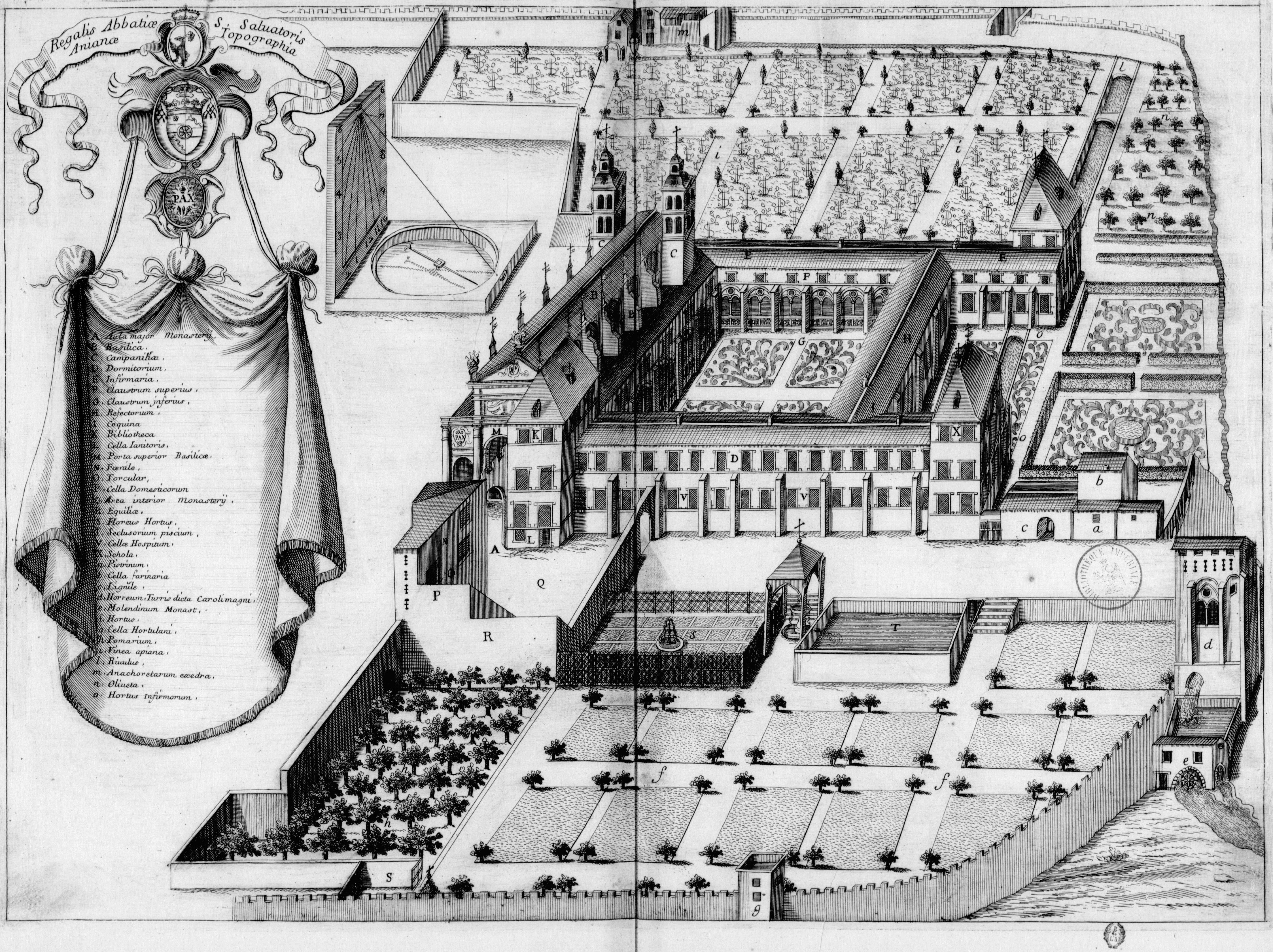 Planche gravée du 17ème siècle représentant l'abbaye Saint-Sauveur d'Aniane, en France, dans le livre Monasticon Gallicanum.